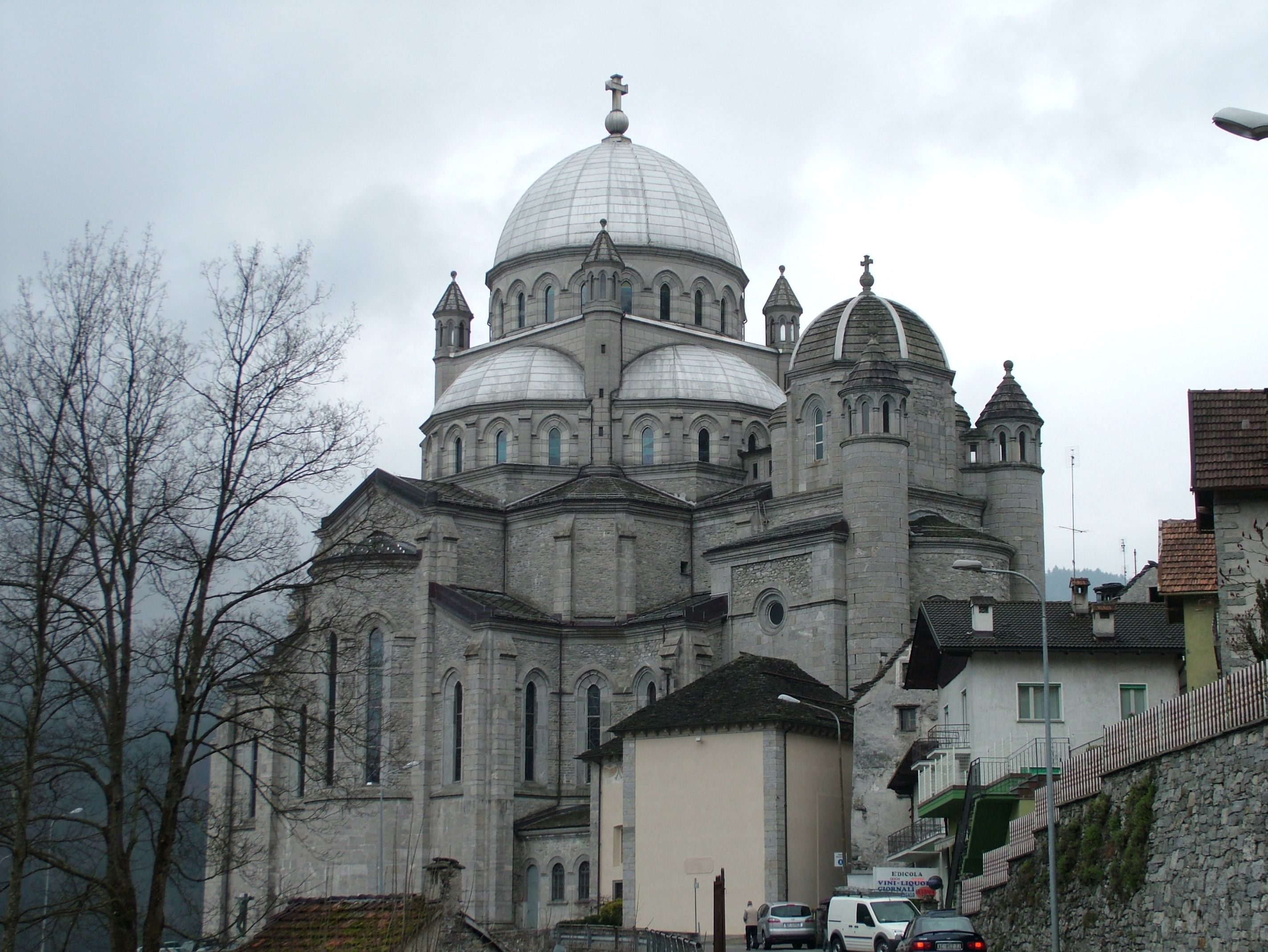 Re, Italien, Piemont, die Wallfahrtskirche.